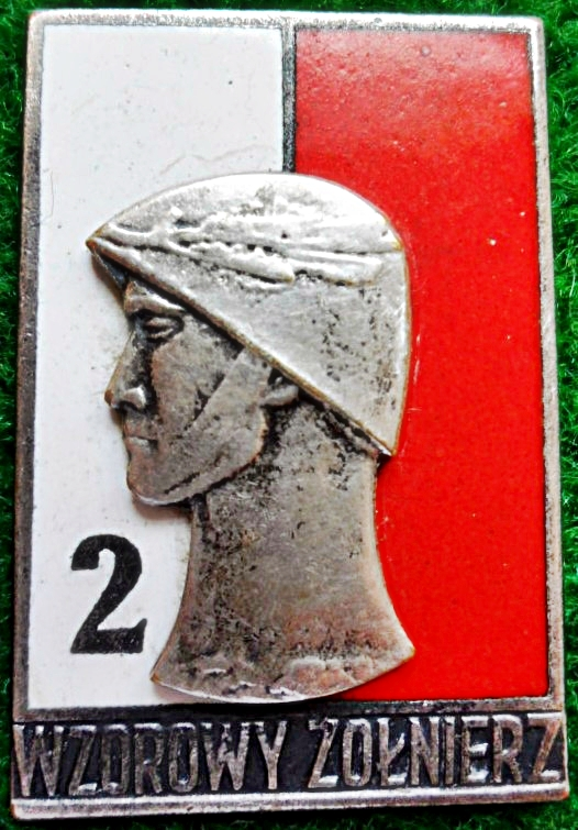 Odznaka Wzorowy Żołnierz